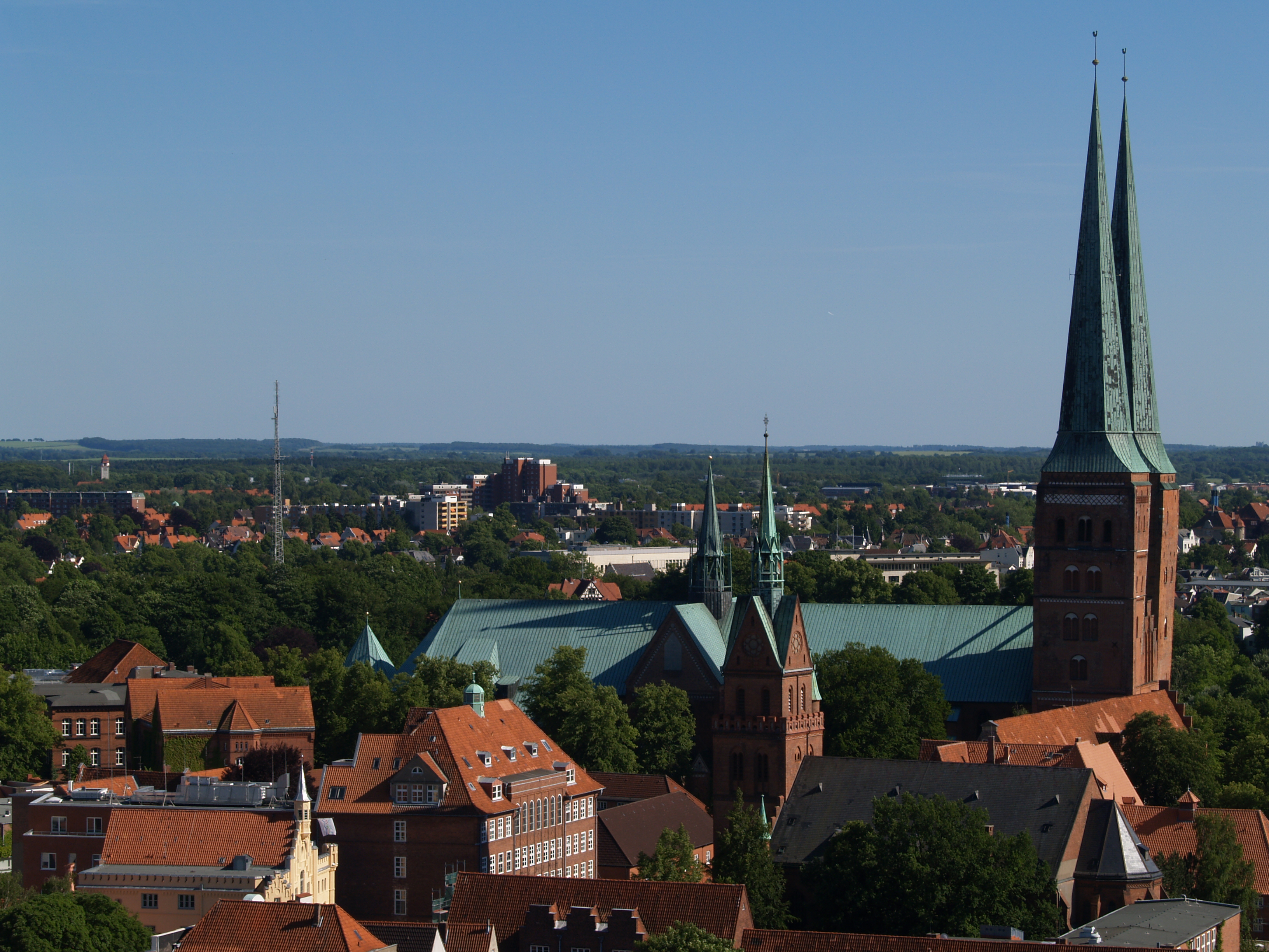 Blick über die Dächer von Lübeck von St. Petri aus nach Süden mit der Domkirche